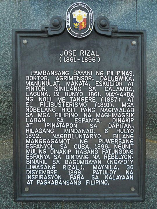 Tagalog: "José Rizal" sa Pinakamataas na Estatwa ni José Rizal sa Liwasang Rizal ng Calamba, Calamba, Laguna